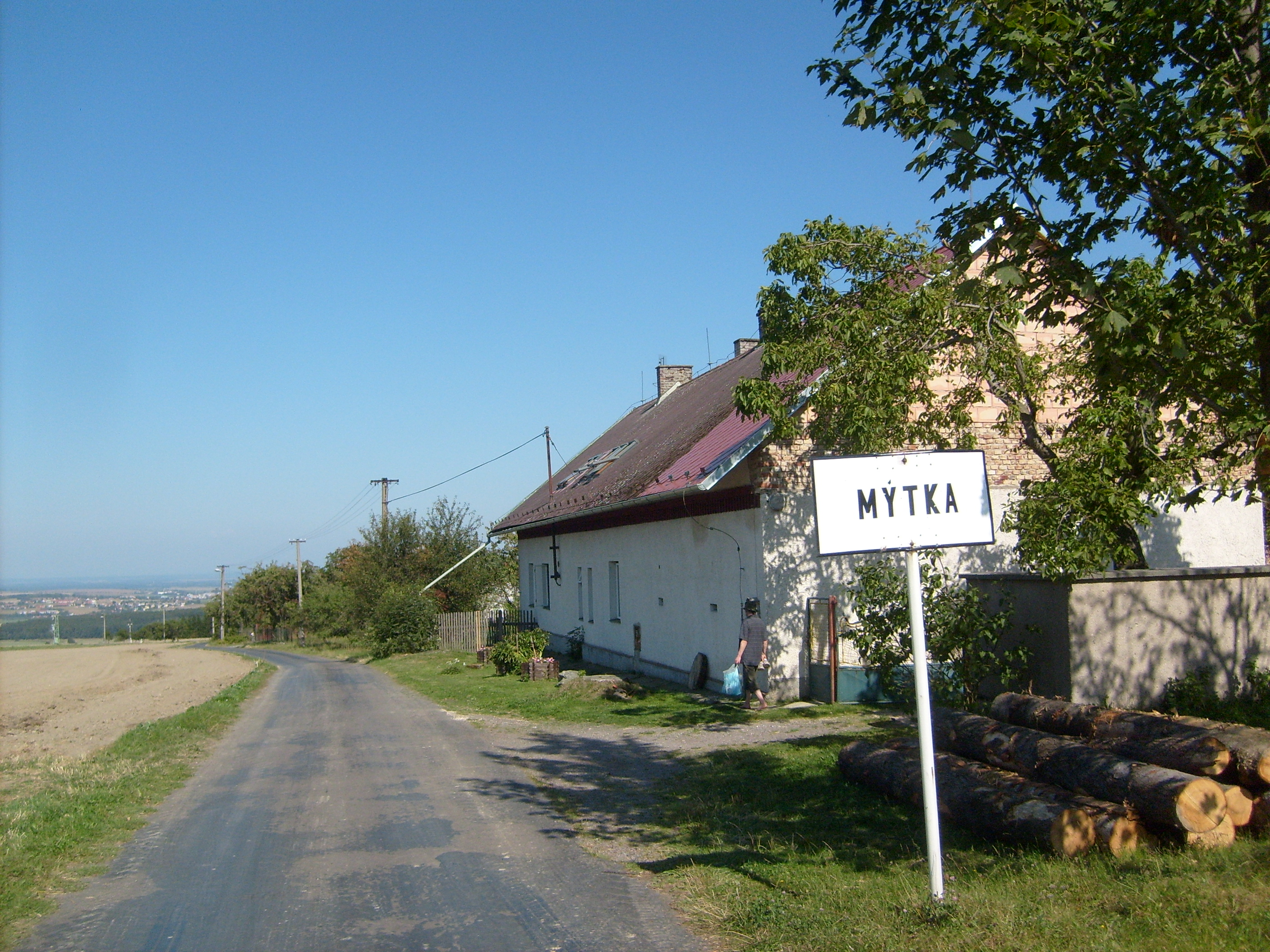 samota Mýtka, okres Chrudim